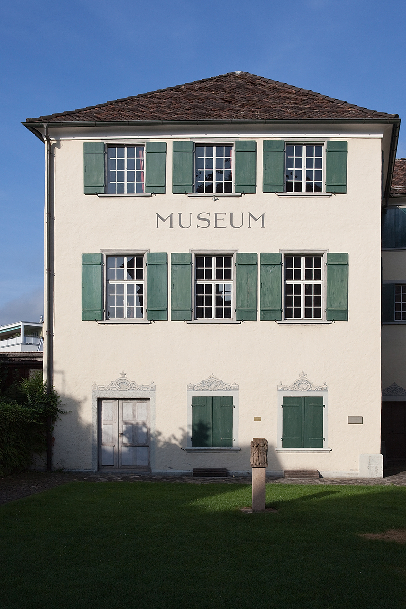 Haus Prestegg mit Historischem Museum in Altstätten (SG)